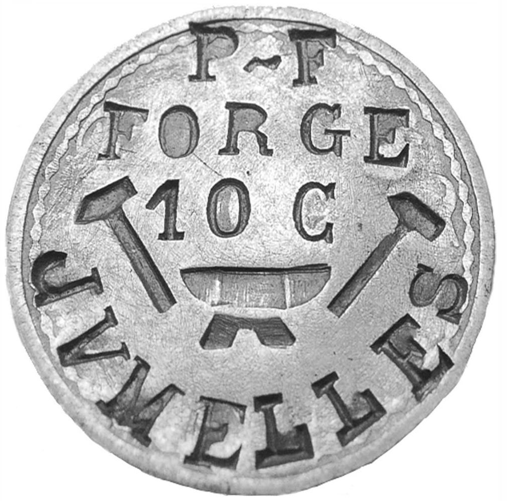 Forge Périgois-Frémont ; Jumelles (49) ; aluminium uniface 1923